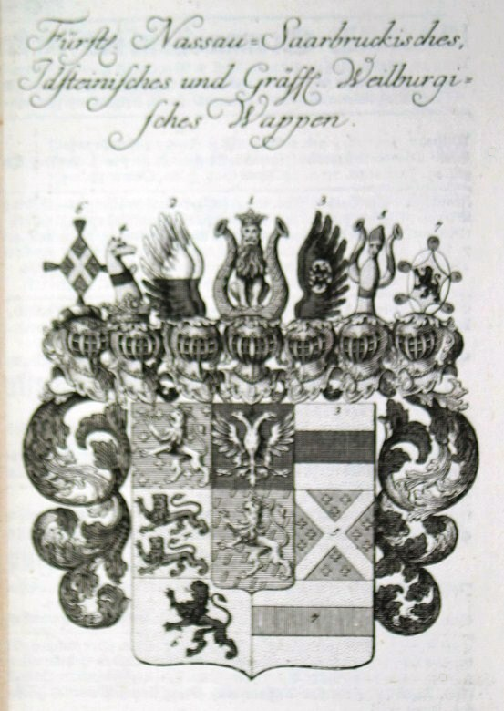 Fürstl. Nassau- Saarbruckisches Idsteinisches und Gräffl. Weilburgisches Wappen